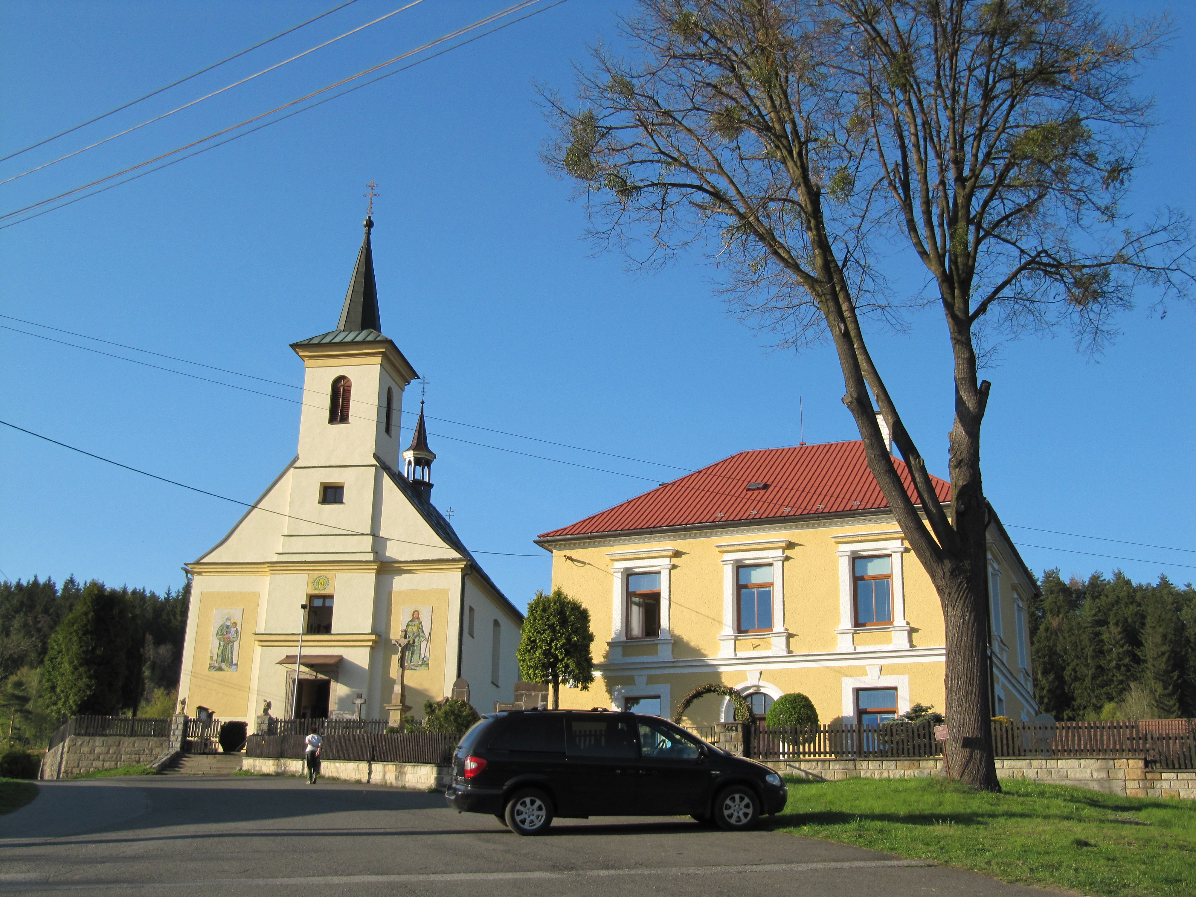 Hutisko